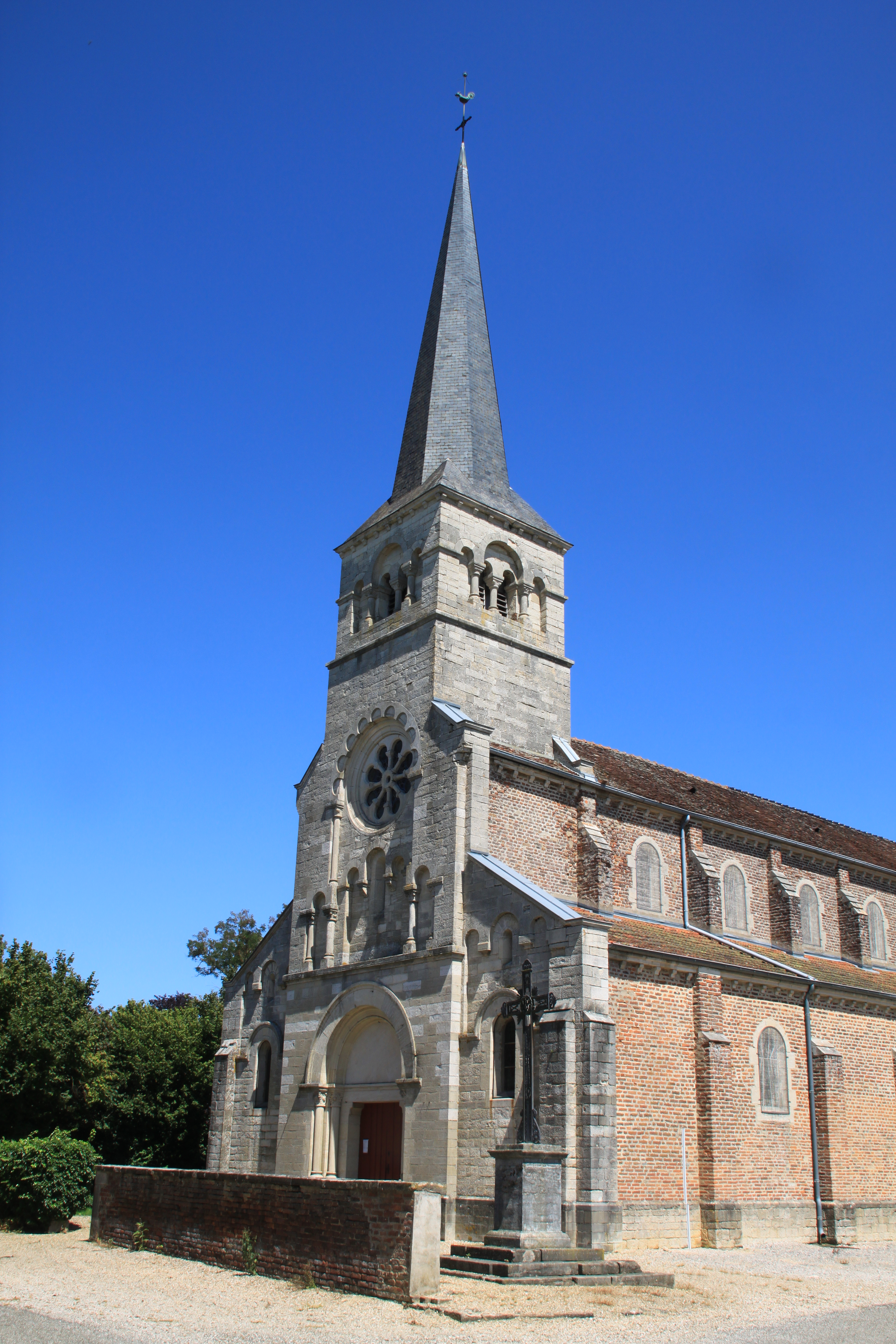 Torpes (Saône-et-Loire) Kirche Westfassade